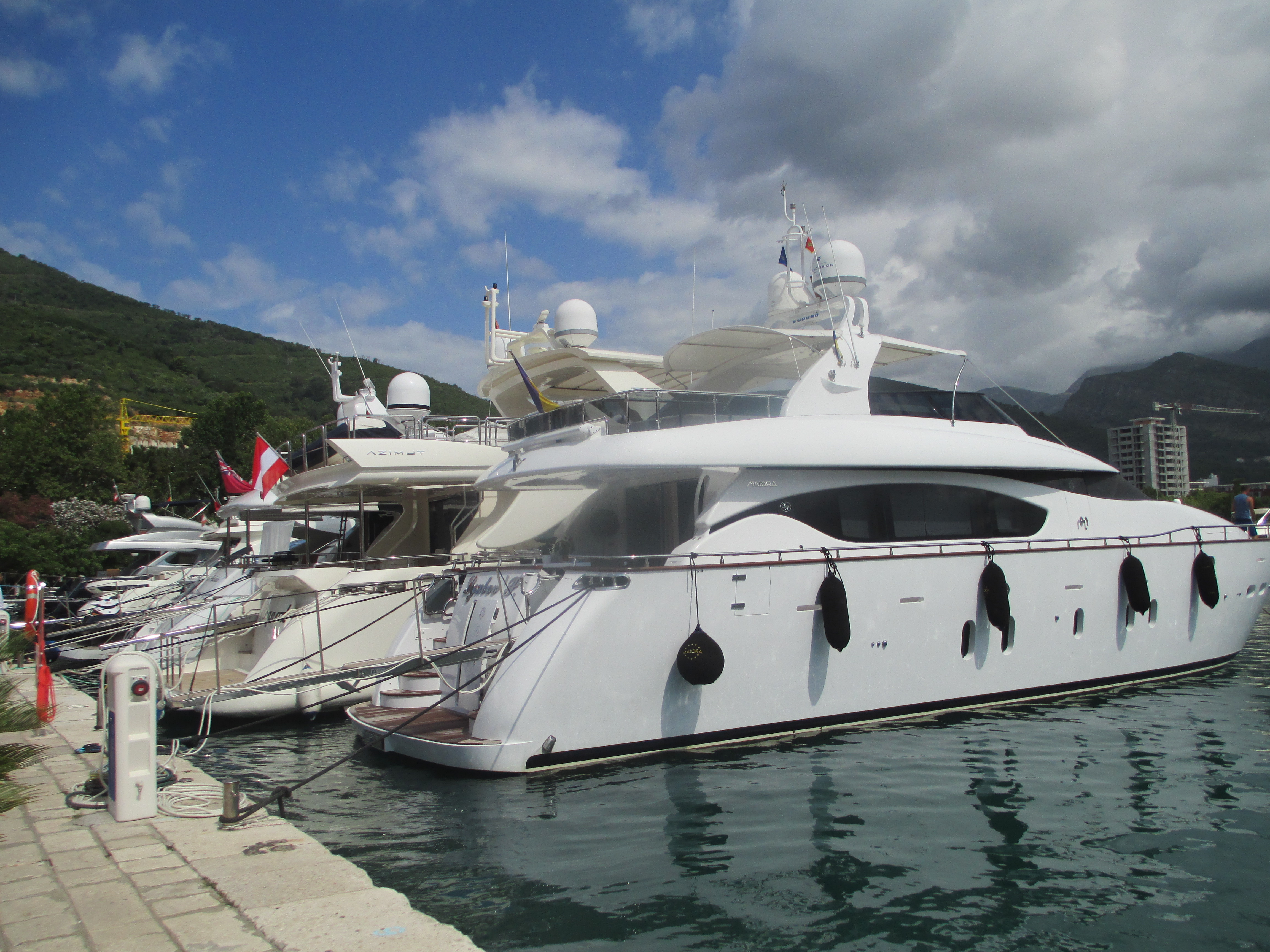 המרינה בבודבה